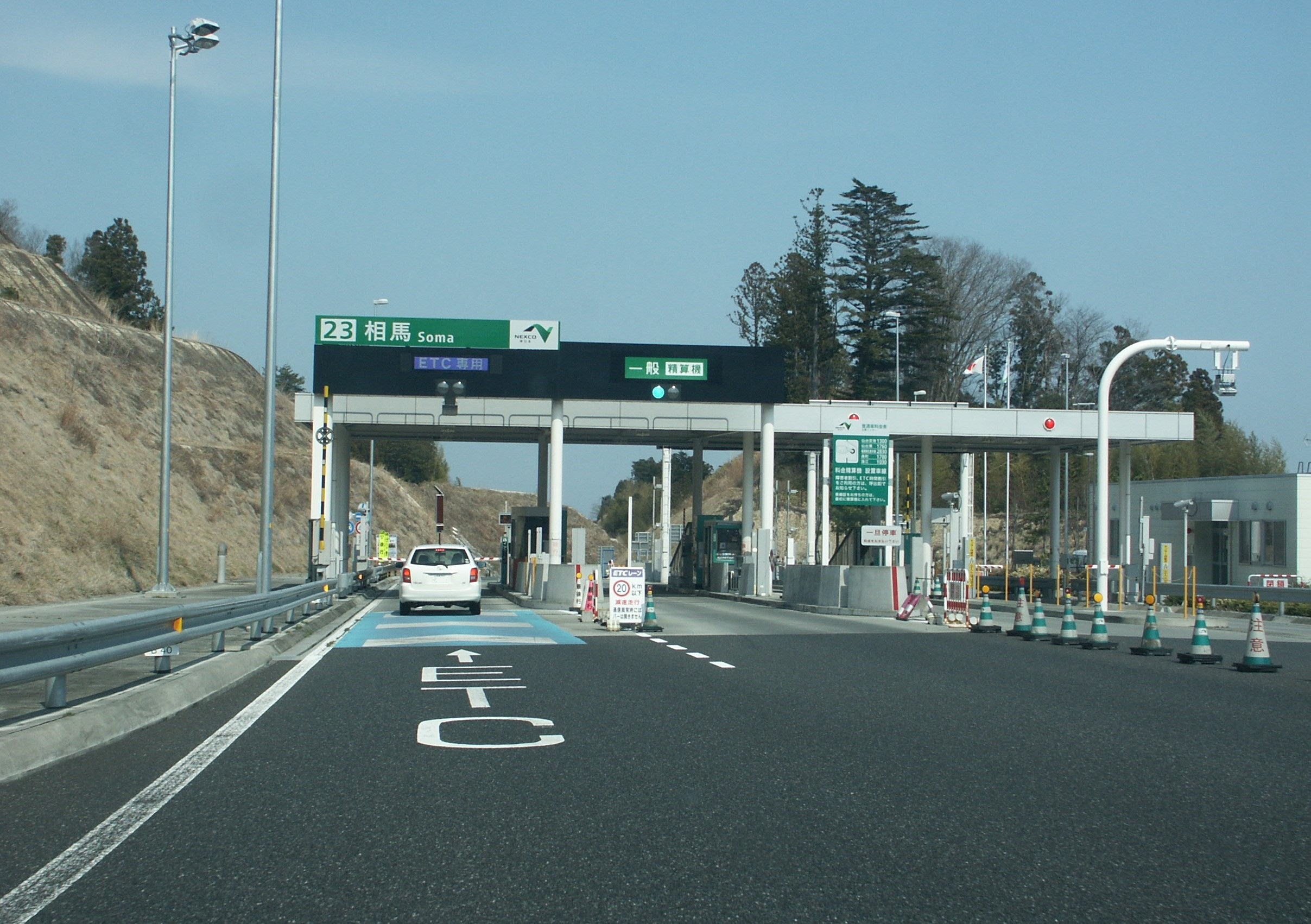 常磐自動車道相馬IC料金所付近